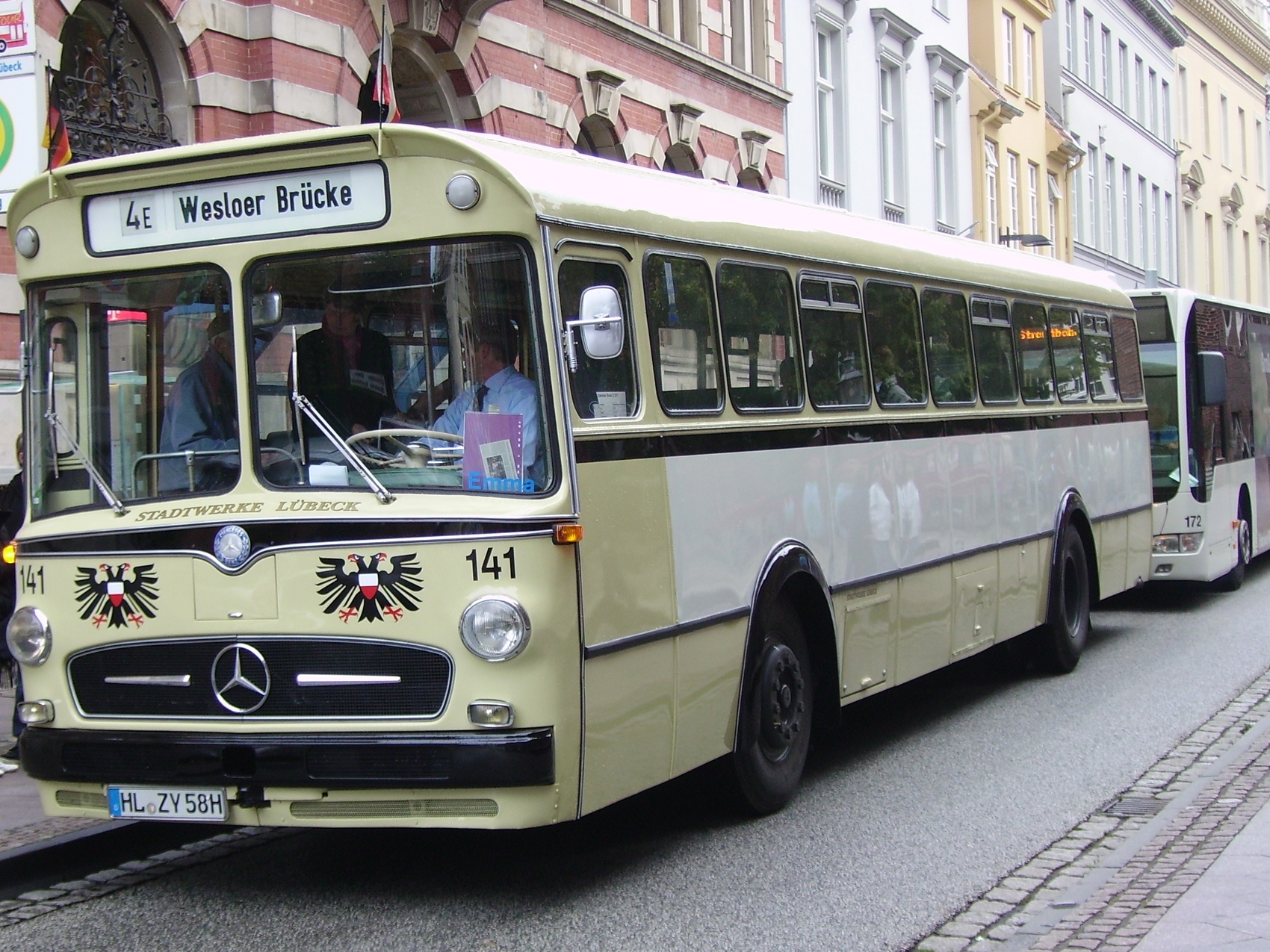 Ein Mercedes-Benz O 317 Bus in Lübeck aus dem Jahr 1959